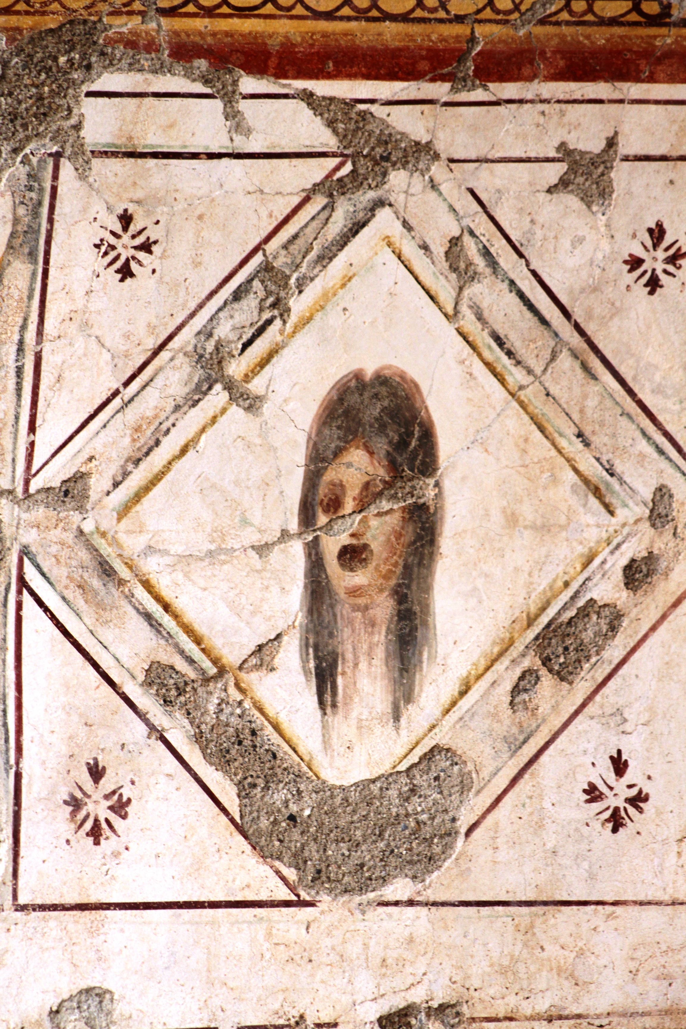 Afresco nas casas romanas de Éfeso